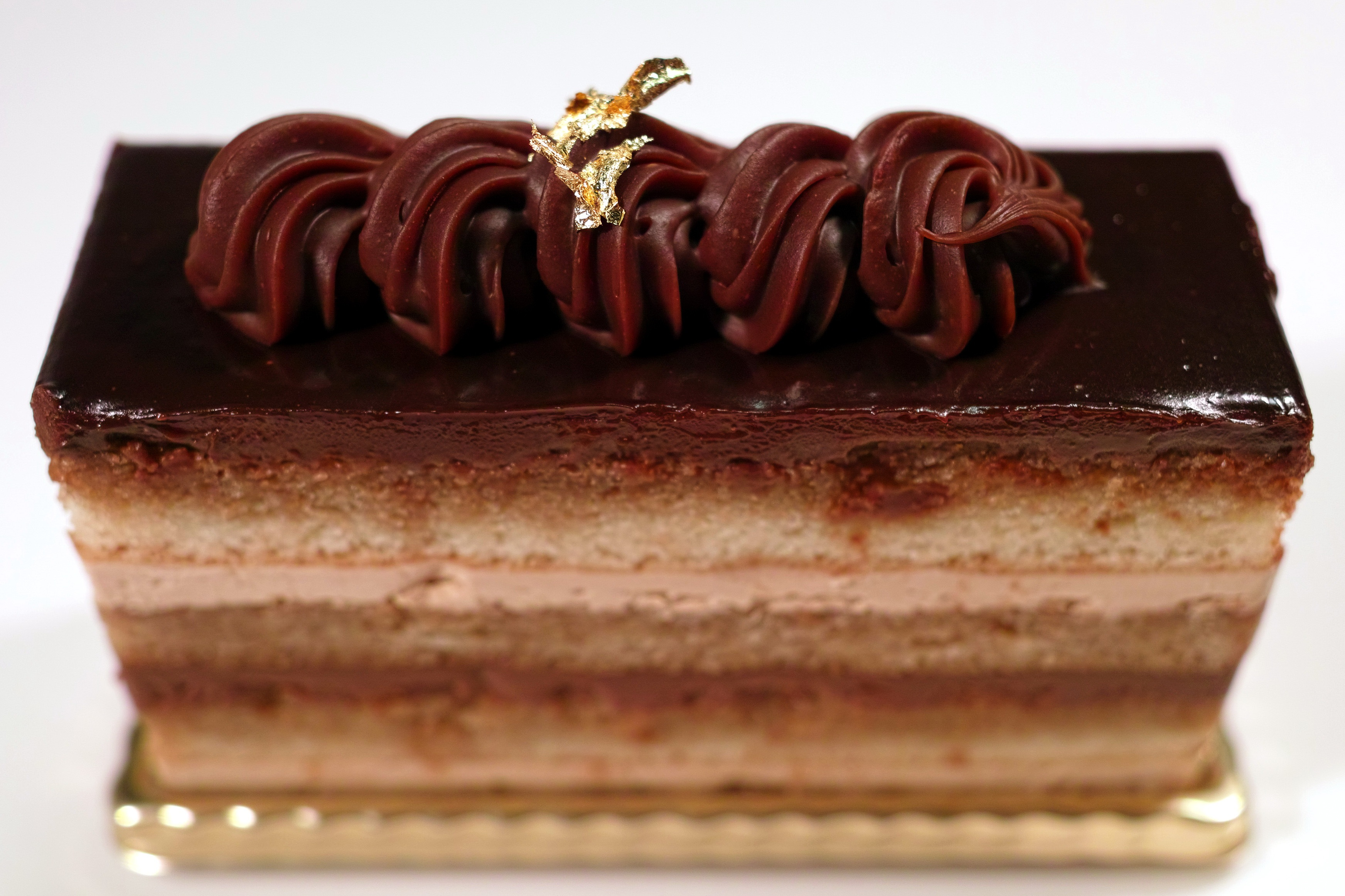 Opéra, pâtisserie au chocolat et au café, constituée d’une succession de biscuits Joconde imbibés d’un sirop au Grand Marnier ou au cointreau, de ganache et de crème au beurre, recouvert par un glaçage au chocolat.